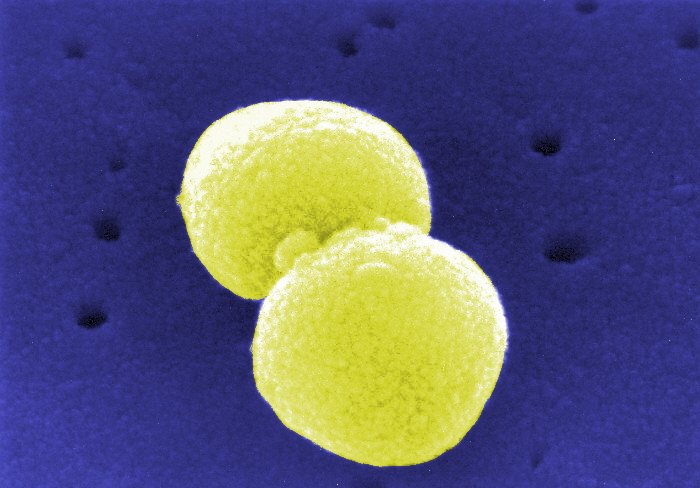 Pneumokokken available at CDC-PHIL